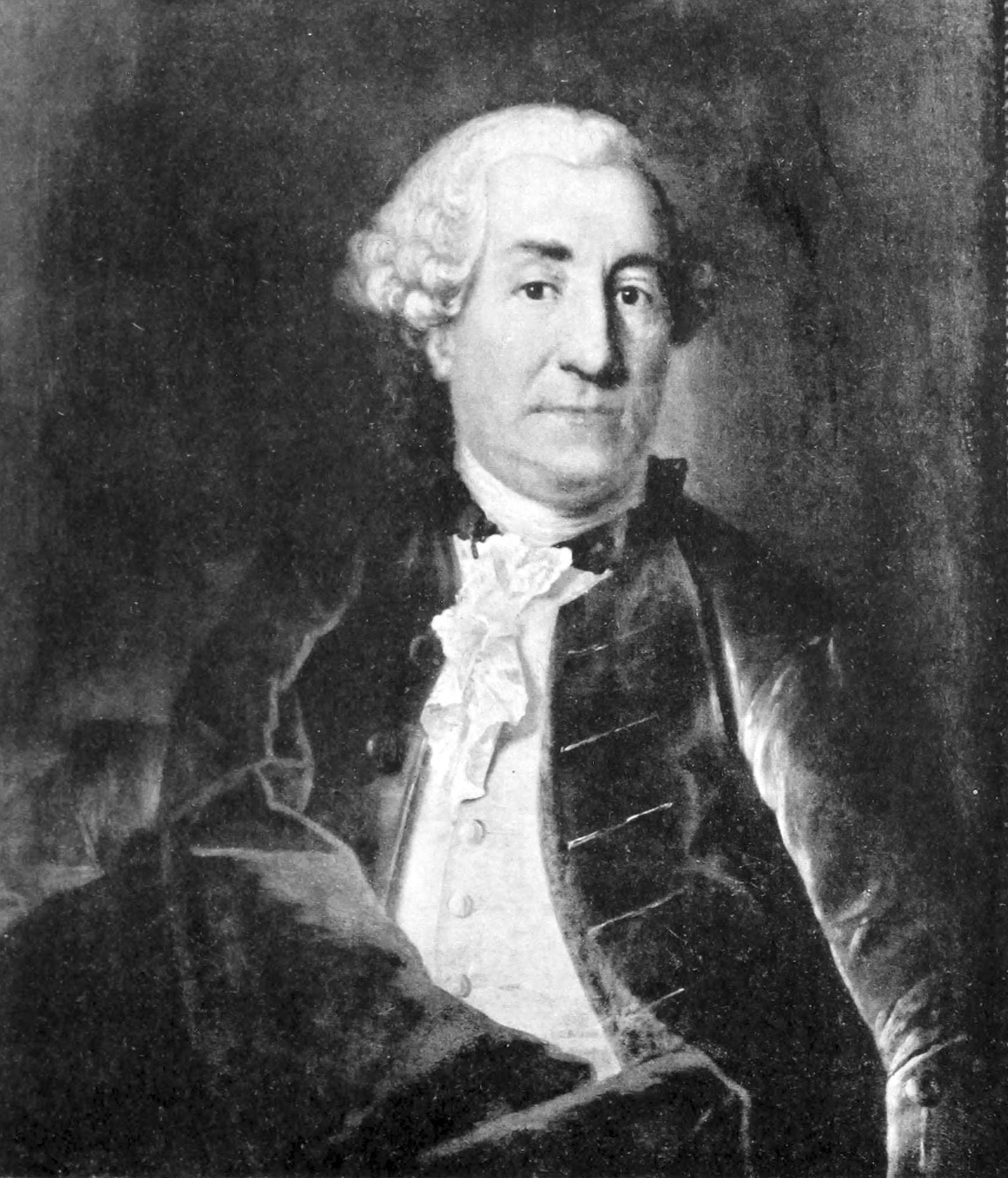 Zacharias Strandberg (1712-1792). Äldre man, bröstbild, fas, hufvudet t. v., kroppen t. h., med bruna ögon, mörka ögonbryn, hvit peruk med tre rader lockar vid örat, det svarta nackbandet om halsen. Hvit lindad halsduk, spetskrås, hvit fasonerad sidenväst med klädda knappar, oknäppt upptill, brun sammetsrock utan krage med klädda knappar och uppknäppta ärmuppslag, oknäppt. Öfver högra axeln och lifvet rödt draperi. Bakgrund mörk oliv. — På baksidan står: Zacharias J. Strandberg Natus d. 18 octobr 1712. Promotus Doctor d. 8 Decembr 1741. Reg. Ammir Stoch. Medicus ordinär d. 3 April 1742. Reg. Colleg. Medici Assessor d. 8 junii 1744, Physicus Civit. Stockh. ordinär d. 18 octobr 1748 [Medicus Orphanotroph Major Stockh. d. 175 ] Denat d. 17 . Kongel. Collegium Medicum tillhörigt. Olja på duk, 83x6772 ctm., af Johan Henrik Scheffel. Medicinalstyrelsen. Eich. o 36